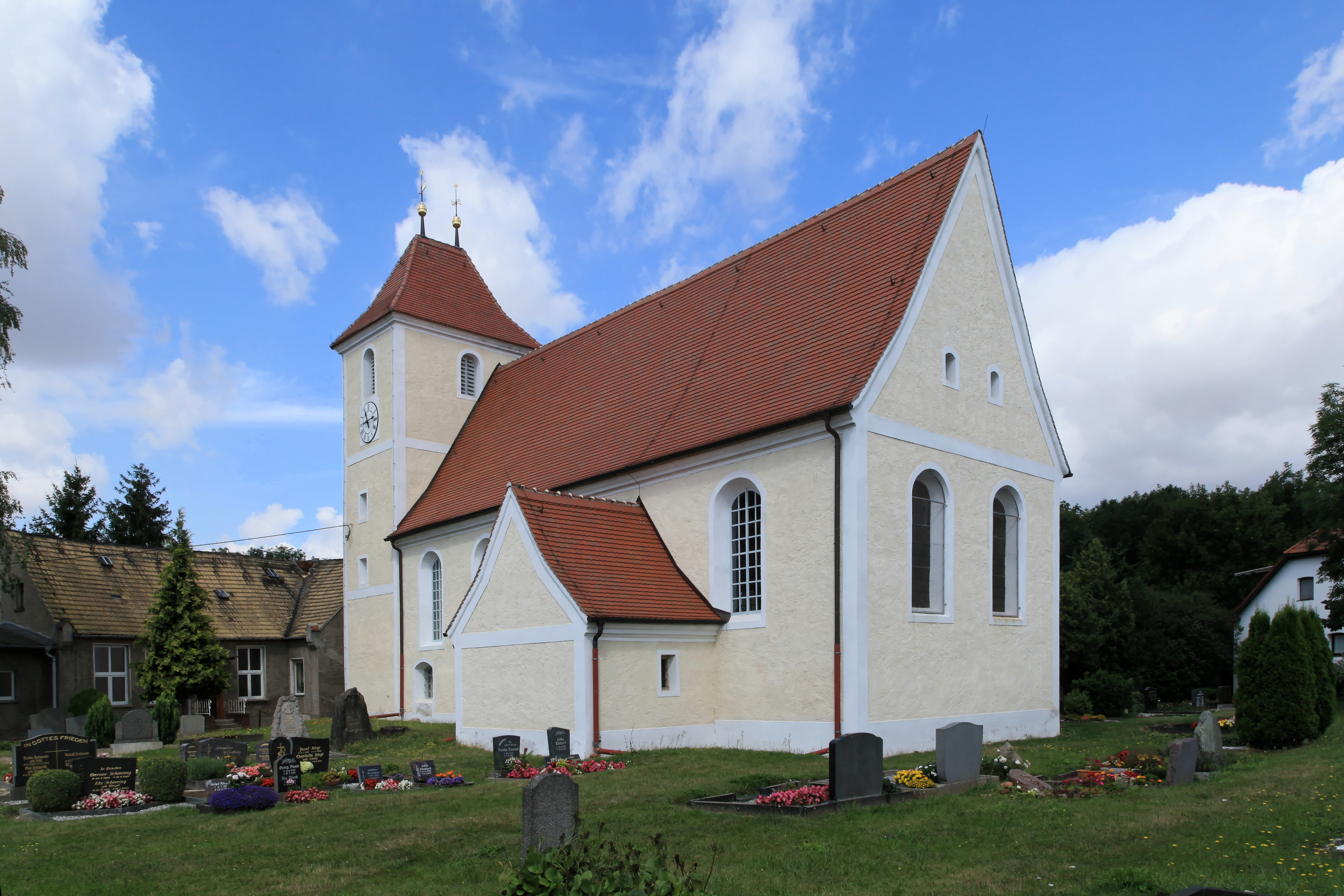 Friedhof und Dorfkirche Weltewitz, Lindenplatz in Weltewitz, Jesewitz